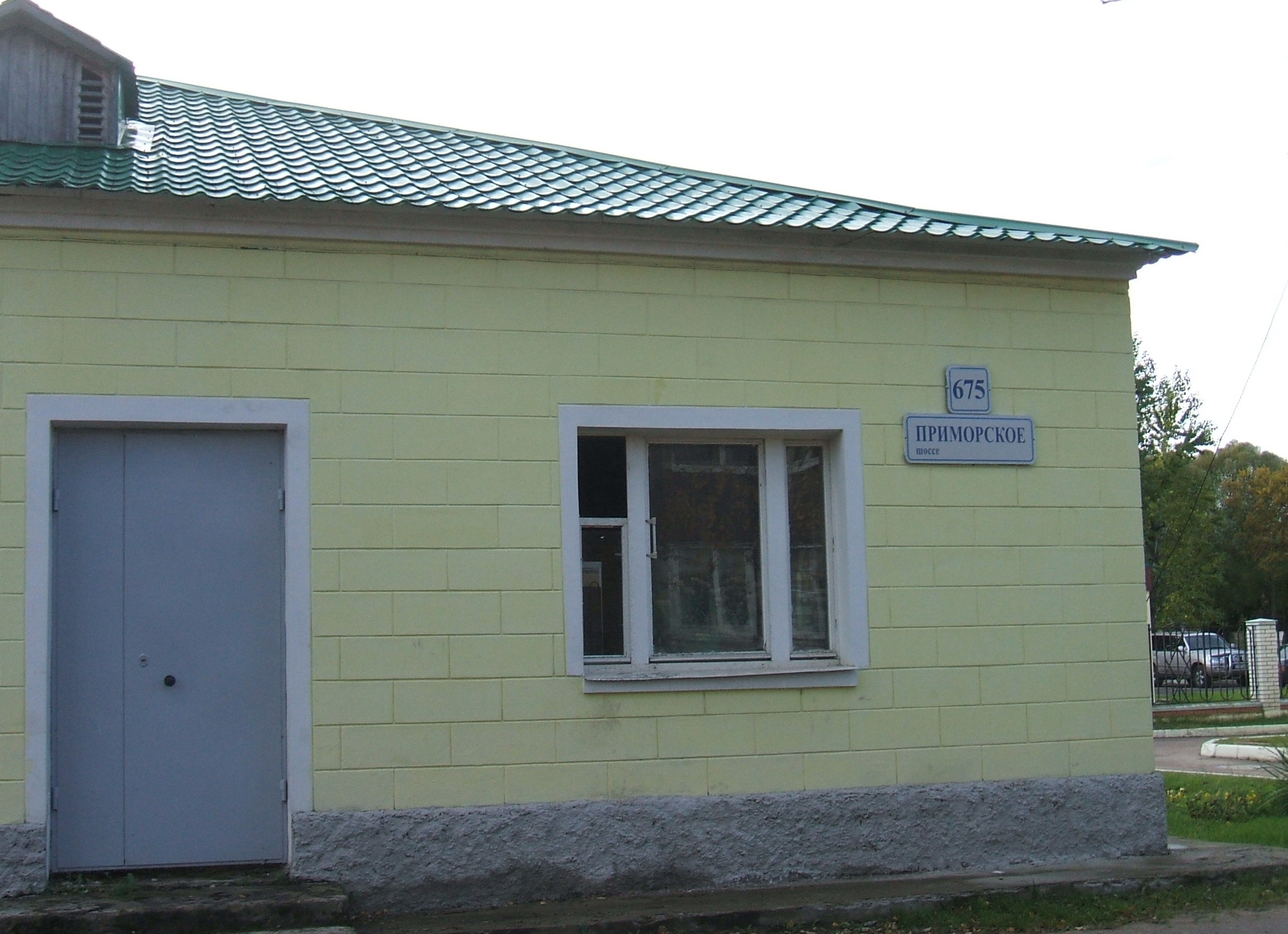 п.Смолячково СПб психо-неврологический интернат №6